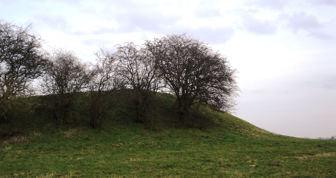 Süseler Schanze - Südwall aus Nord